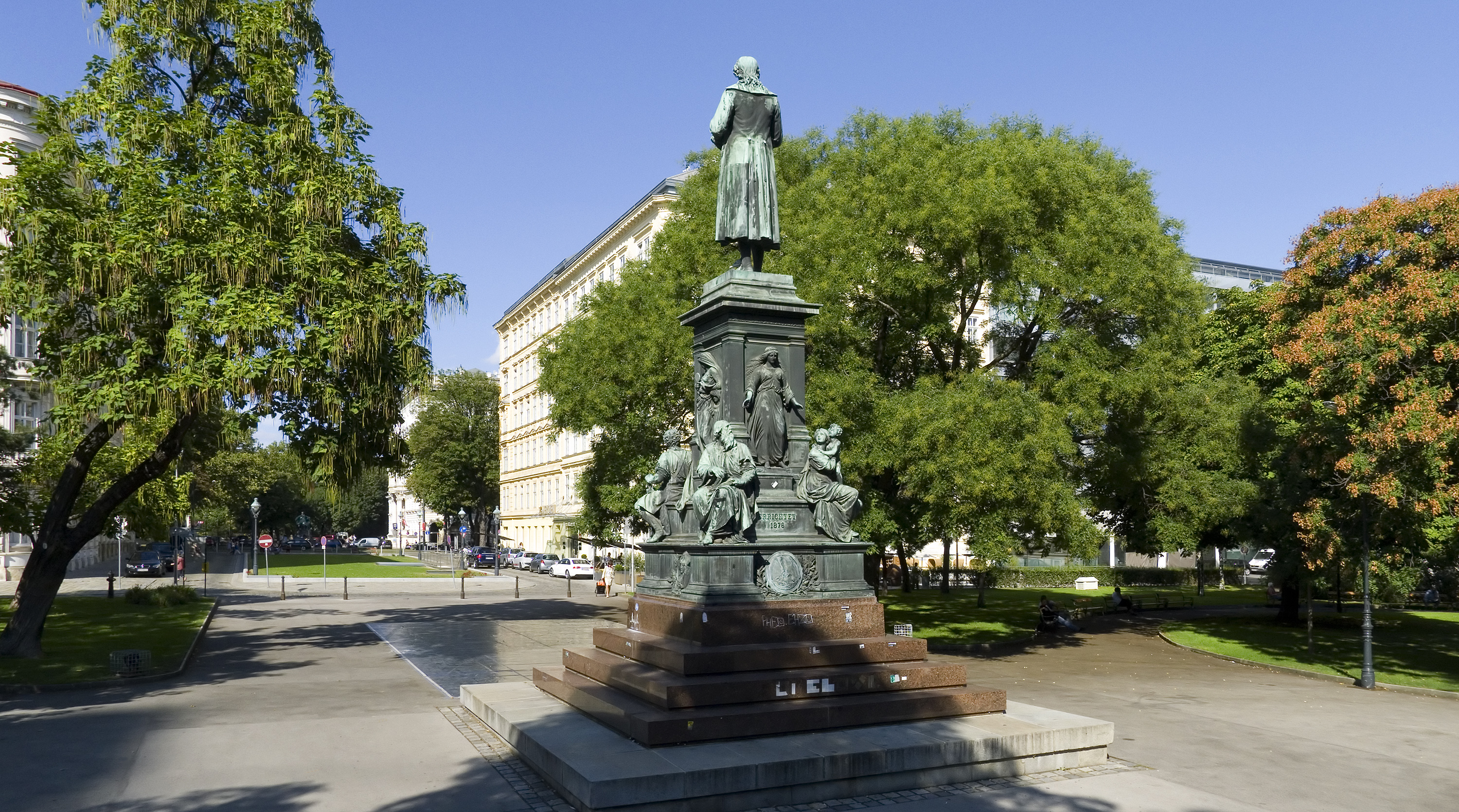 Schillerplatz in Wien 1 Richtung Norden